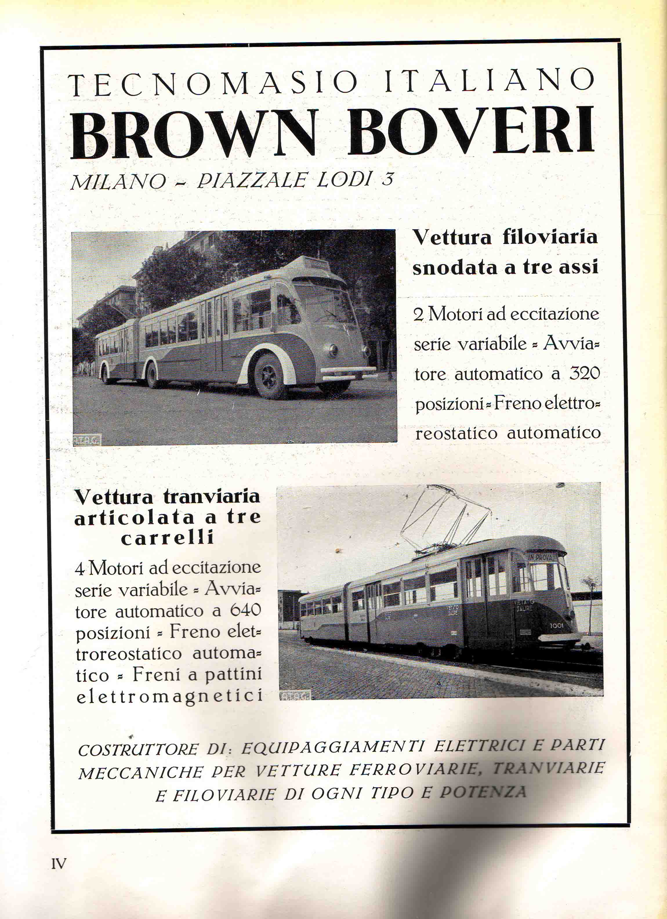 Pubblicità filobus e tram Tecnomasio Italiano Brown Boveri. Dalla rivista "Capitolium", luglio 1942.